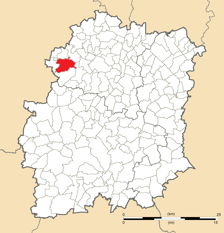 Carte de position de Limours en Essonne